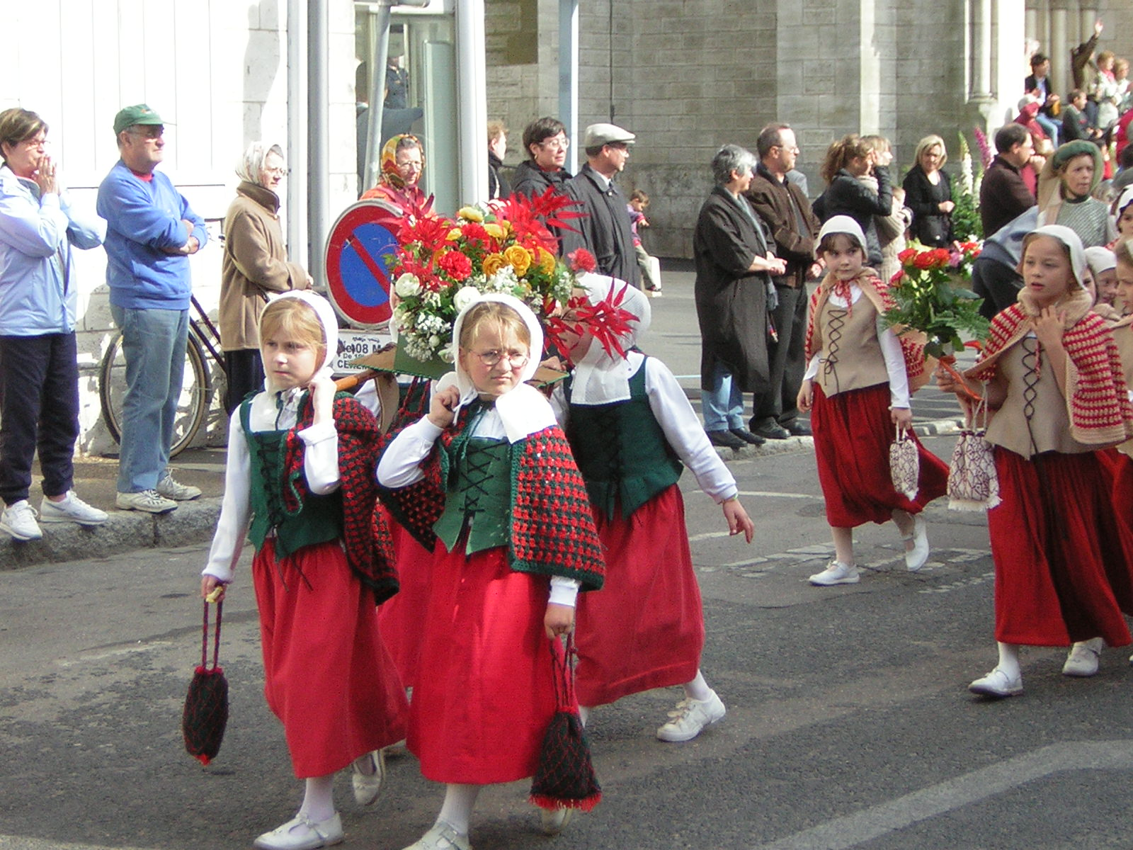 Fêtes de Jeanne d'Arc à Orléans (Loiret)